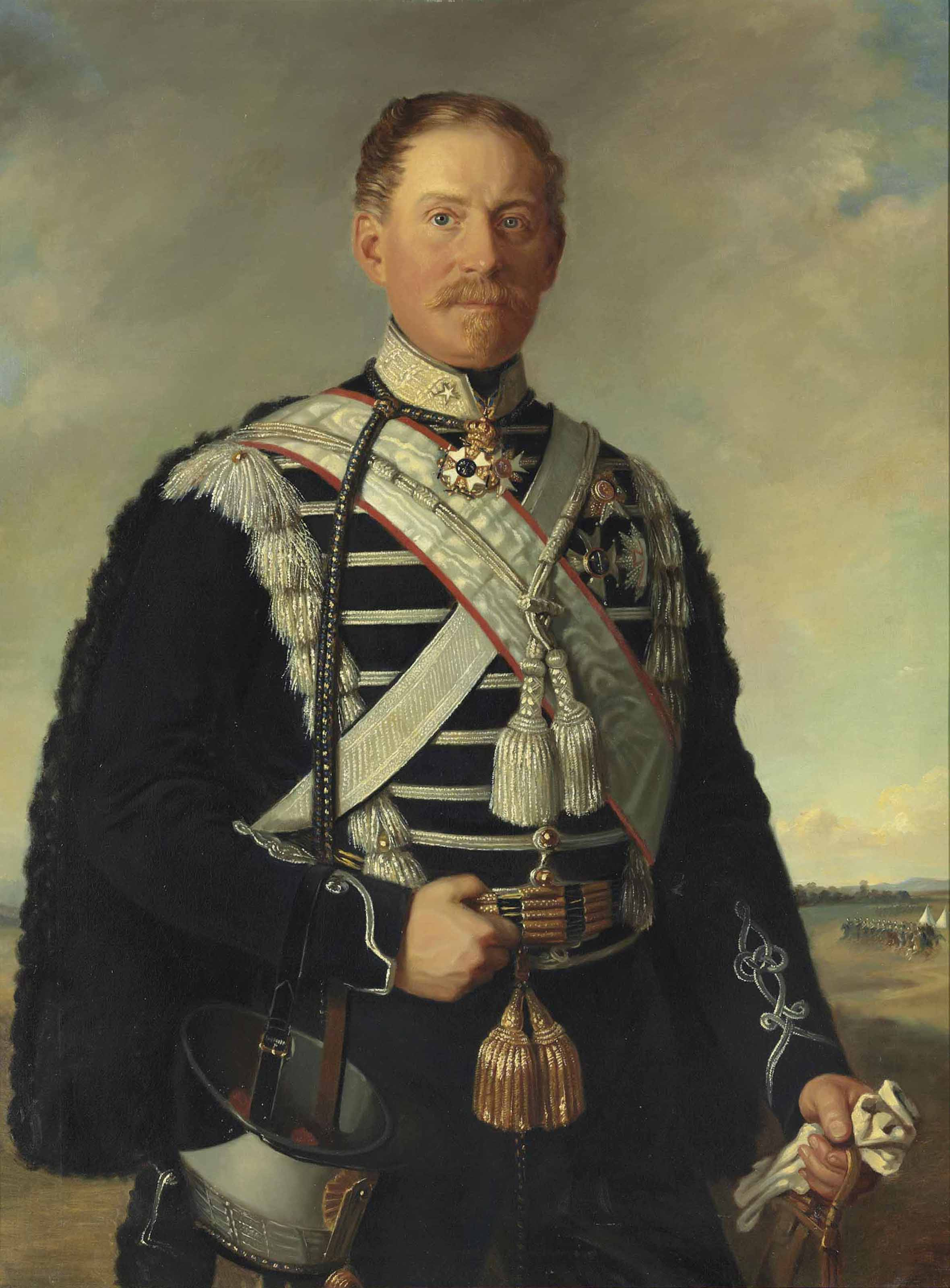 Friherre Carl Herman Leuhusen (1810 - 1879) iklädd uniform för Livregementets husarer. På kragen bär han en stjärna, som visar att han är generalmajor. Runt halsen bär han kommendörstecken för Svärdsorden och Sankt Olavs orden. På bröstet bär han kraschan för Sankt Olavs orden överst, samt under för Svärdsorden och Dannebrogsorden. Över axeln bär han Dannebrogsordens band. I bakgrunden ser man en skvadron ur Livregementets husarer som går till anfall. Målning av okänd konstnär, målning från innan 1869 (då han blev kommendör med stora korset av Svärdsorden det året).